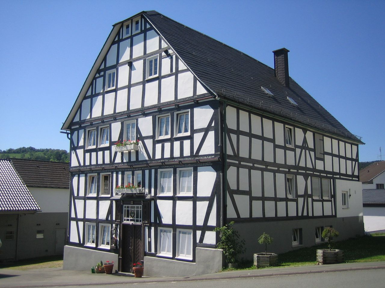 Baudenkmal Ortstraße 4 in Hallenberg